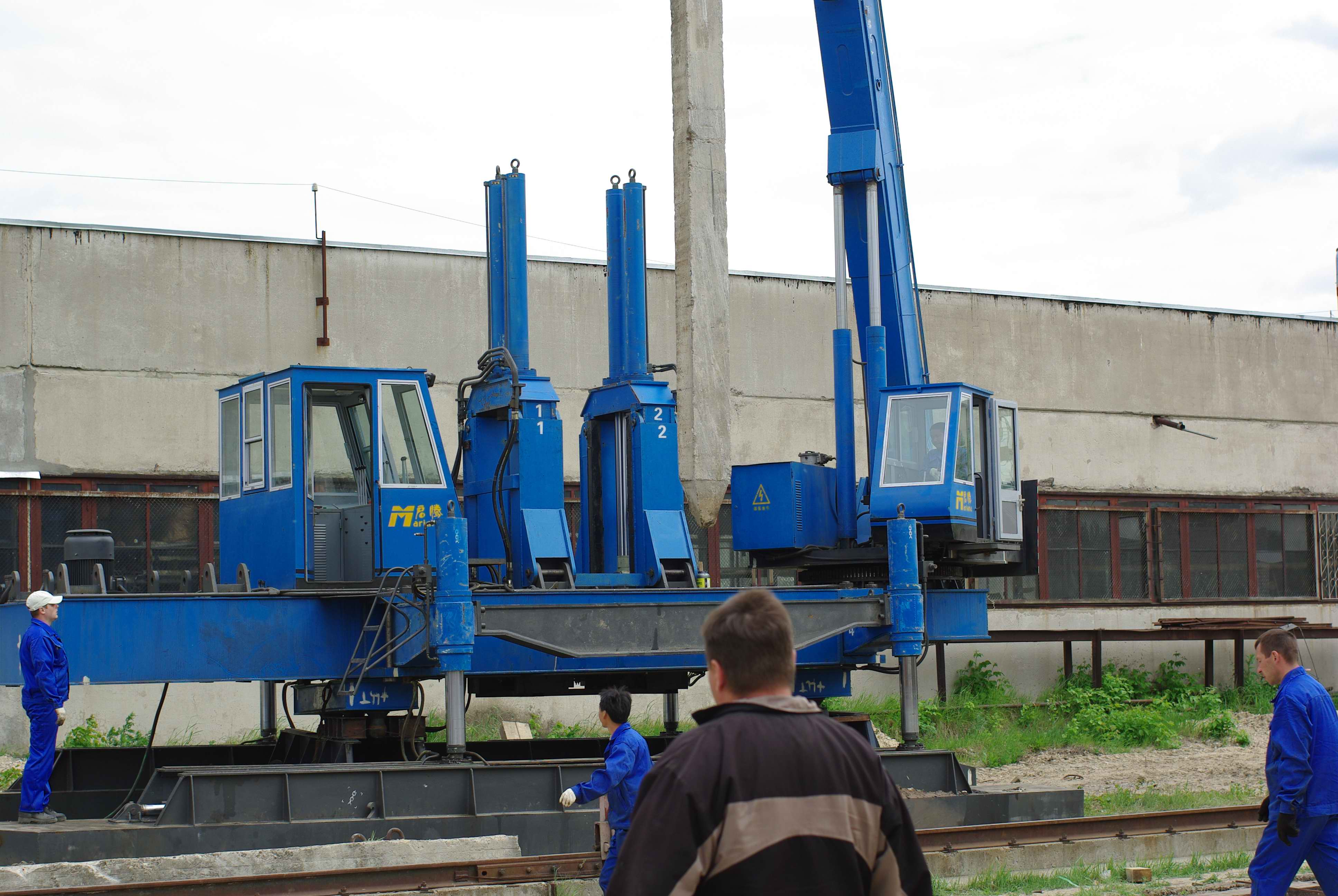 Установка работает в Дзержинске